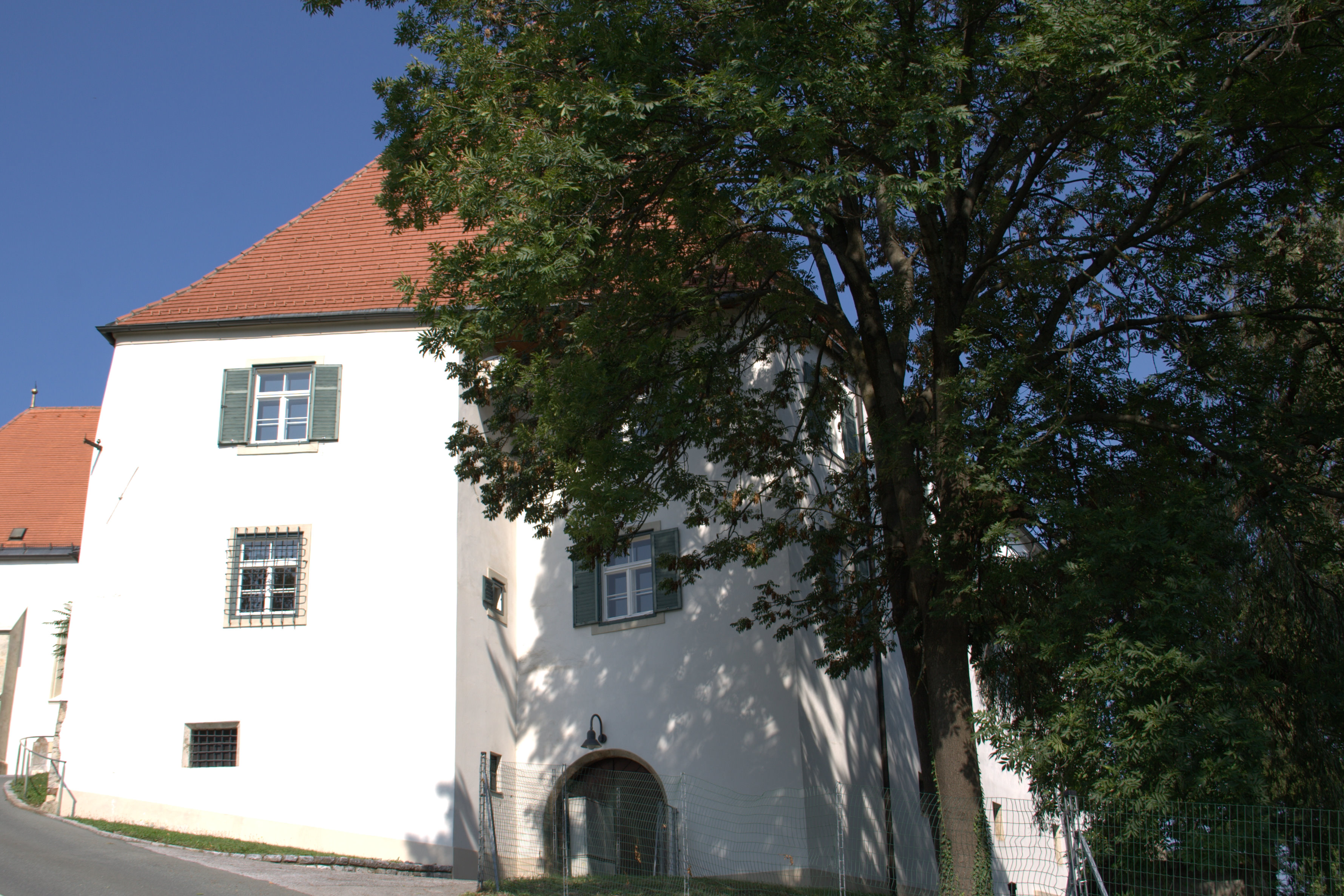 Pfarrhof in Straßgang, Graz